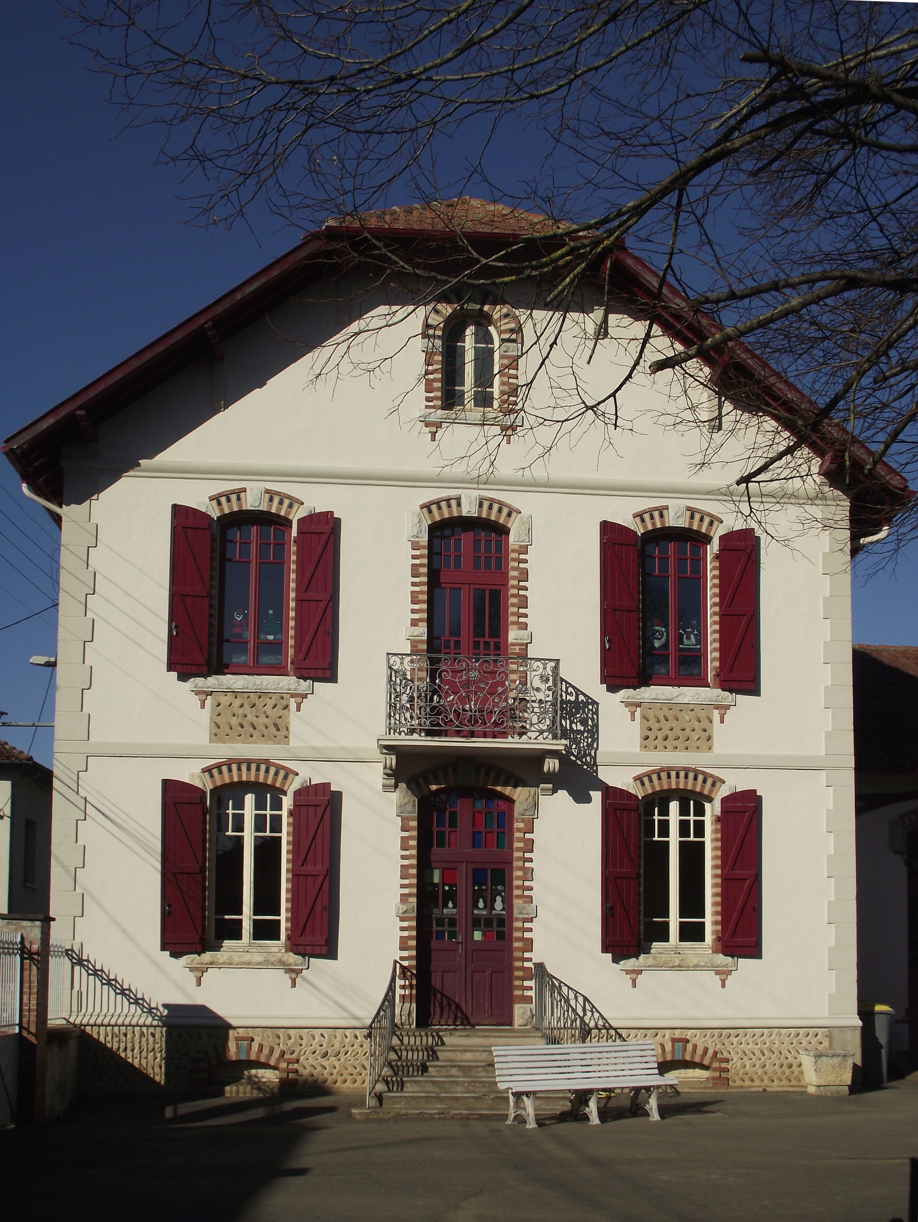 École maternelle de Tournay (Hautes-Pyrénées, France)